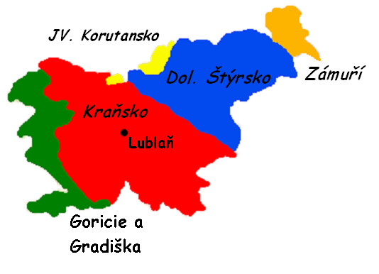 Slovinská historická uzemí mapa